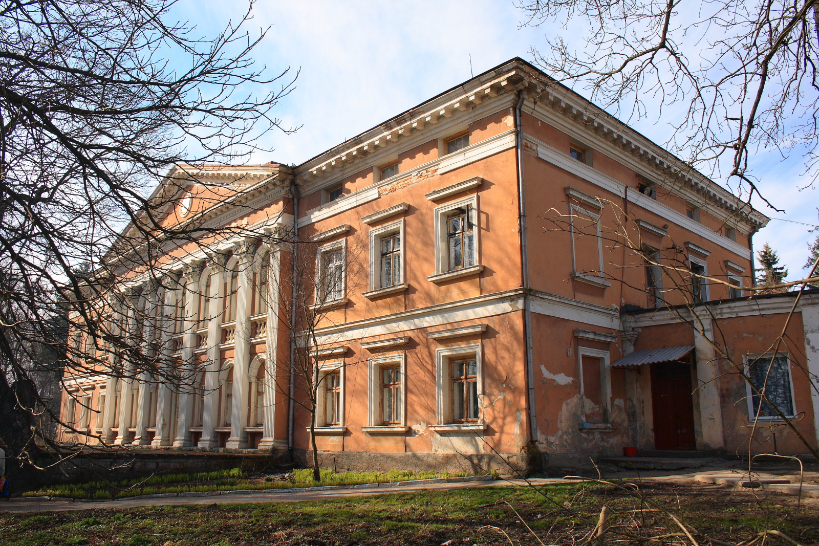 Микулинці